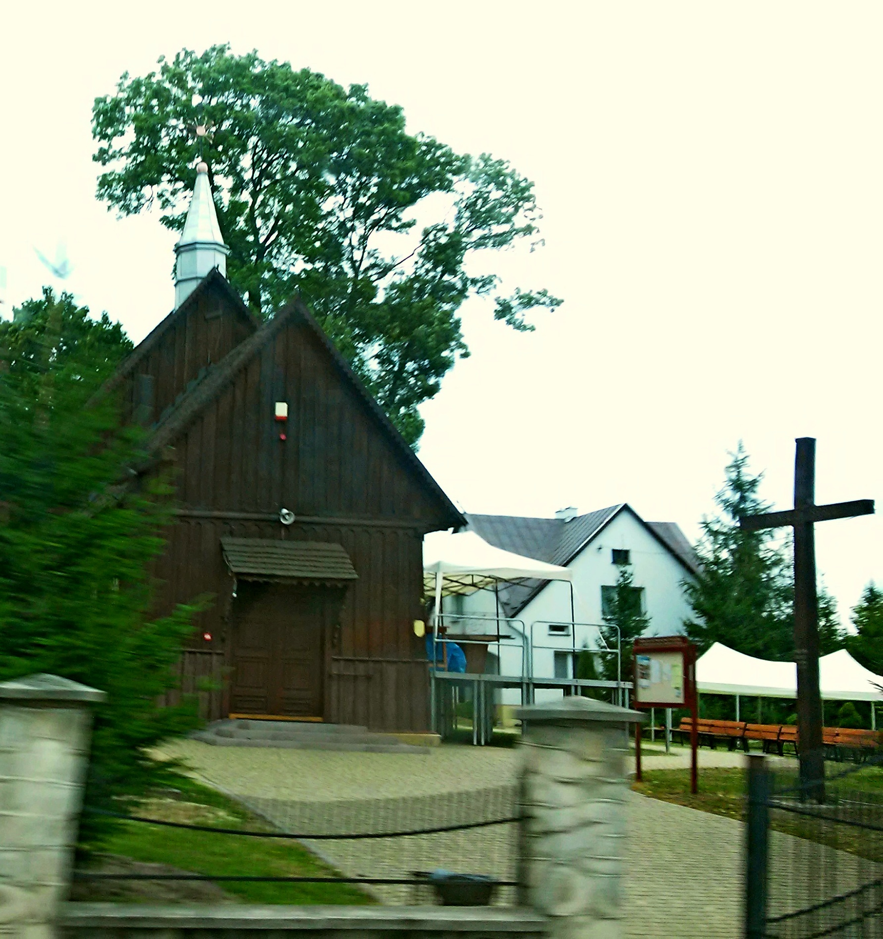 Dawna cerkiew, obecnie kościół w Żmudzi